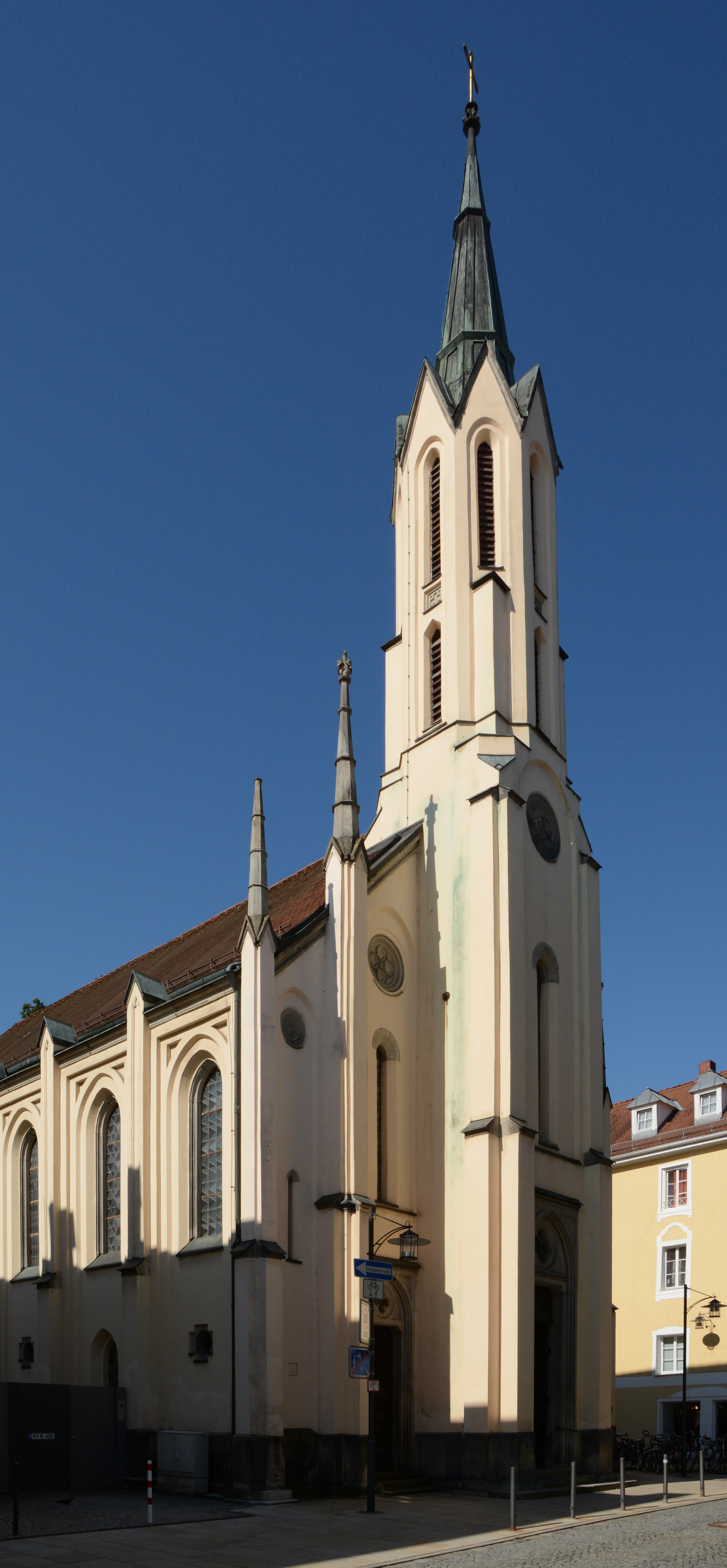 Die Evangelisch-Lutherische Pfarrkirche St. Matthäus in der Theresienstraße 12 in Passau. This is a photograph of an architectural monument.